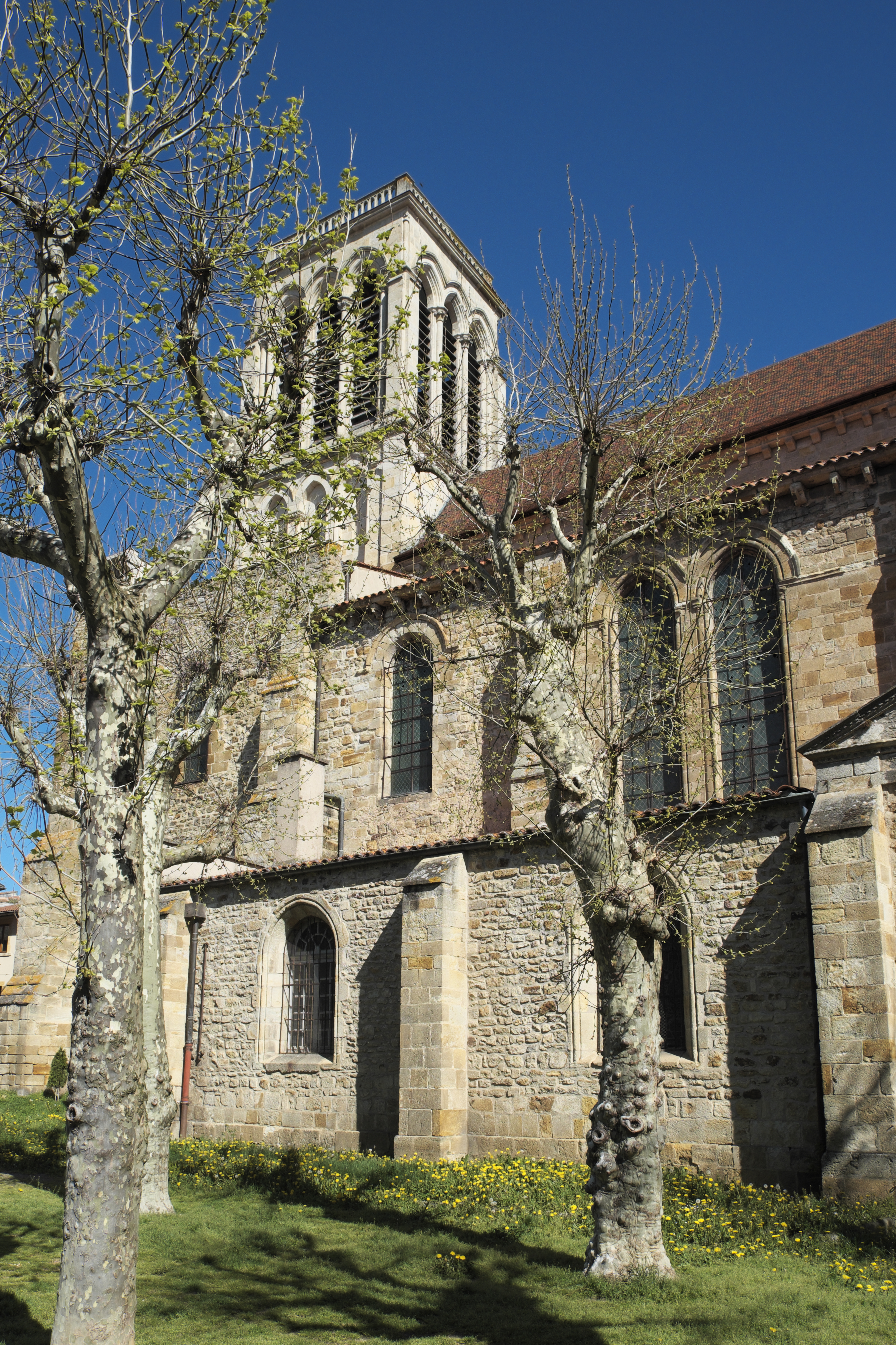 Katholische Pfarrkirche, ehemalige Stiftskirche, Saint-Cerneuf in Billom im Département Puy-de-Dôme (Auvergne-Rhône-Alpes)